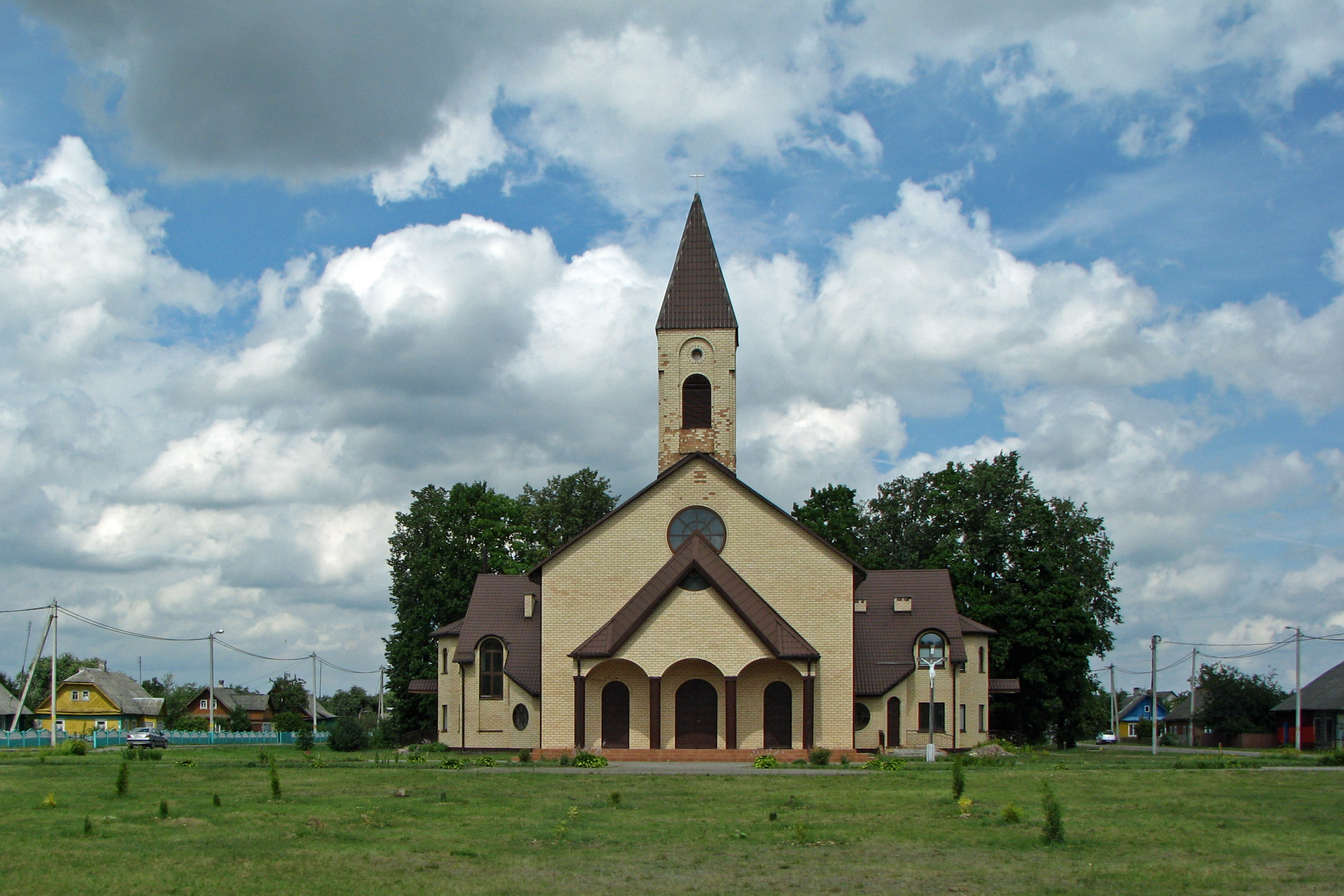 Посёлок Юратишки, Костёл Преображения Господня (Гродненская область, Беларусь). 2016 год.